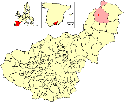 Situación de la localidad de Canal de San Clemente (en el municipio de Huéscar) respecto a la provincia de Granada, en España.